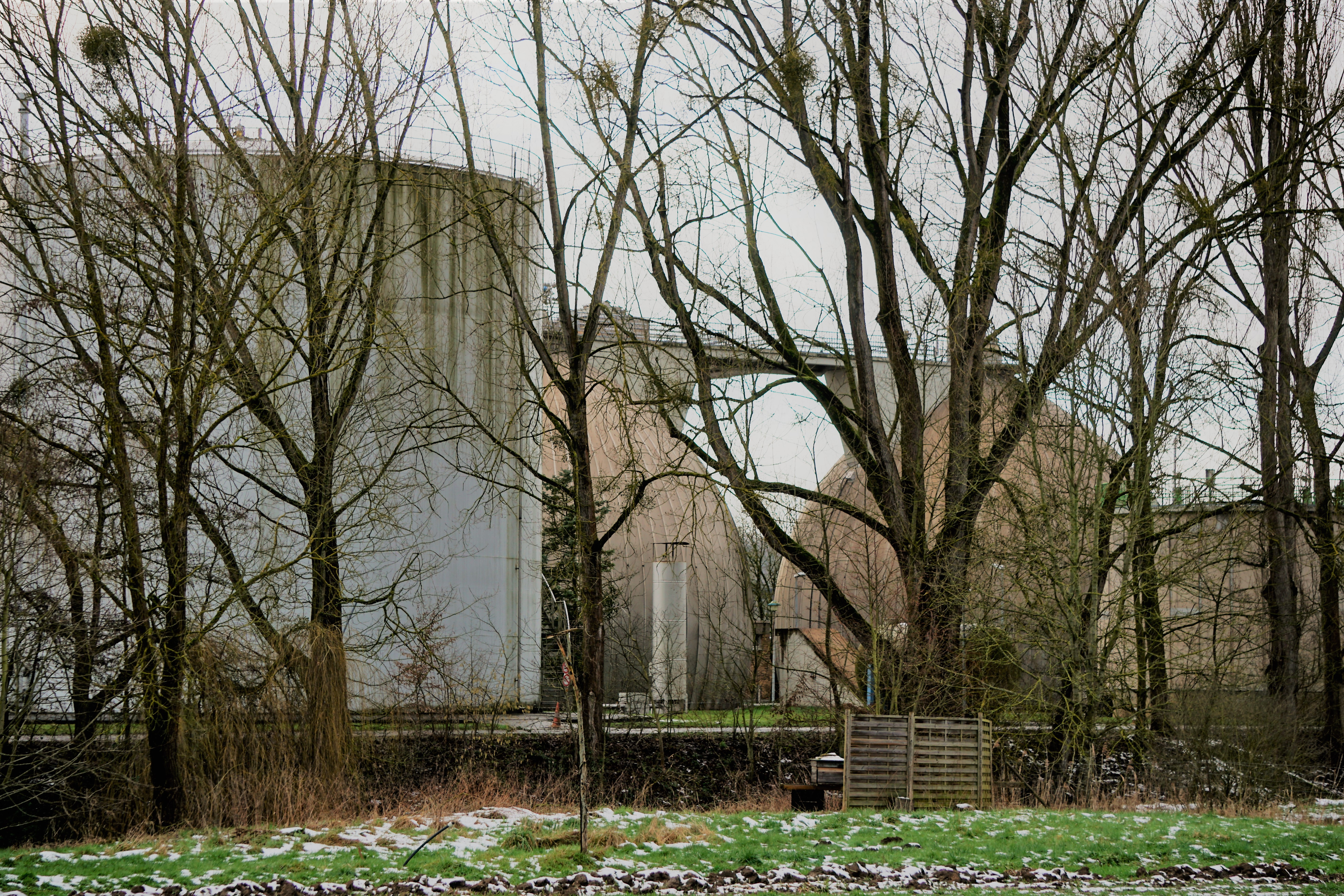 Luxembourg, la station d'épuration Beggen sur le territoire de la commune de Walferdange. Vue du côte est.